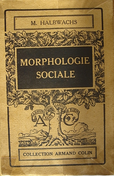 Couverture du livre de Maurice Halbwachs, Morphologie sociale